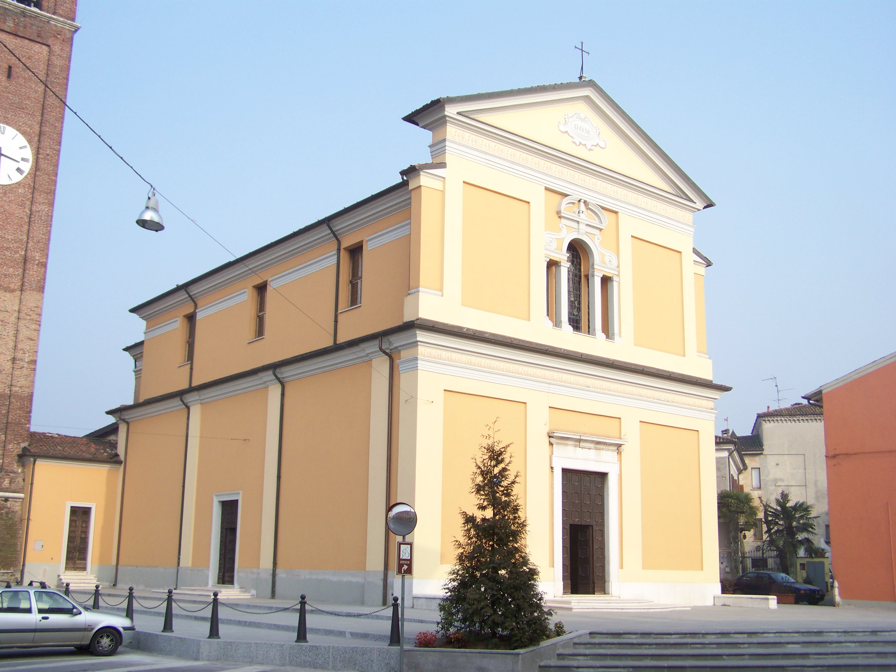 Facciata della Chiesa parrocchiale di Offlaga dedicata ai Santi Pietro e Paolo